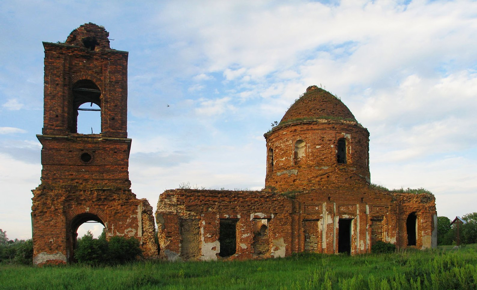 Преображенская церковь со Скорбященским приделом (Рязанская область, Михайлов, село Внуково)